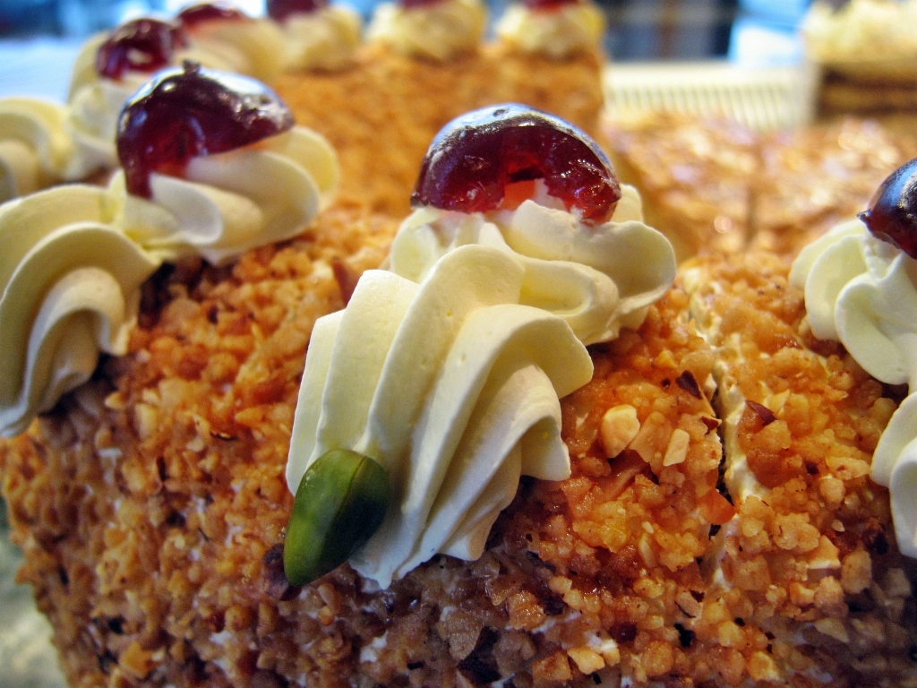 Gefüllt mit Buttercreme und Sauerkirschmarmelade, umhüllt von Krokant.